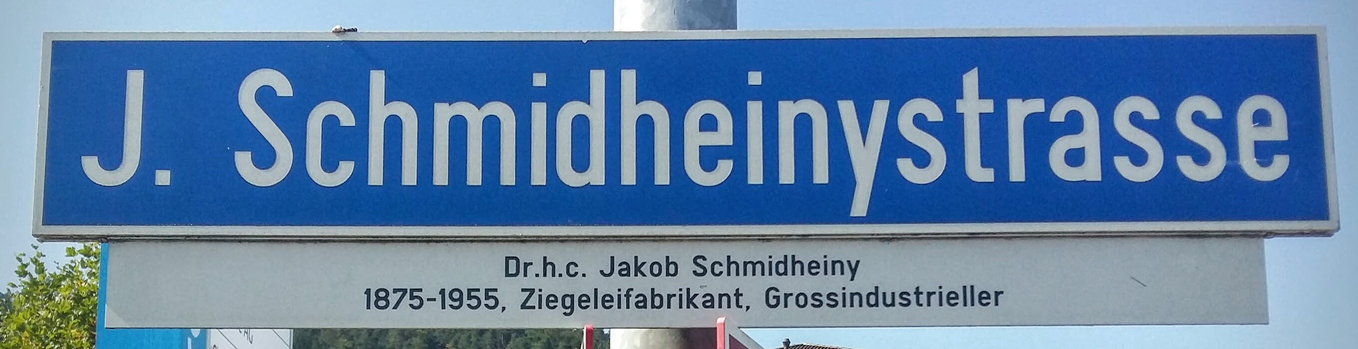 Jacob Schmidheinystrasse in Heerbrugg (Gemeinde Balgach)